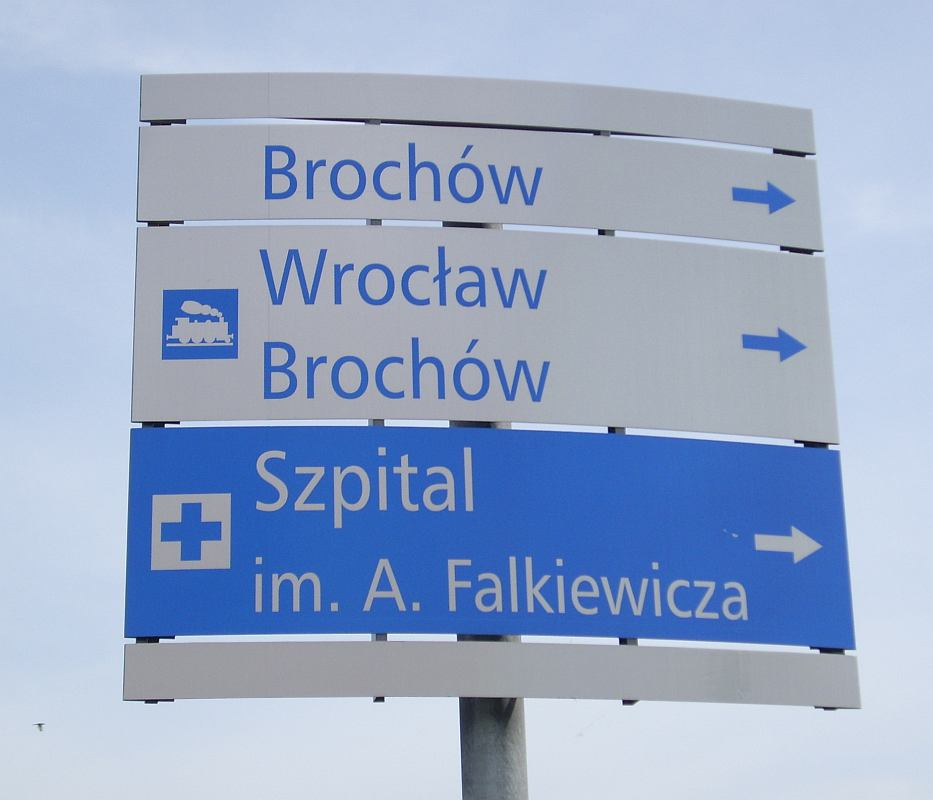 Drogowskaz miejski na wrocławskim Tarnogaju.